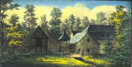 Ansicht des Roisdorfer Mineralbrunnens